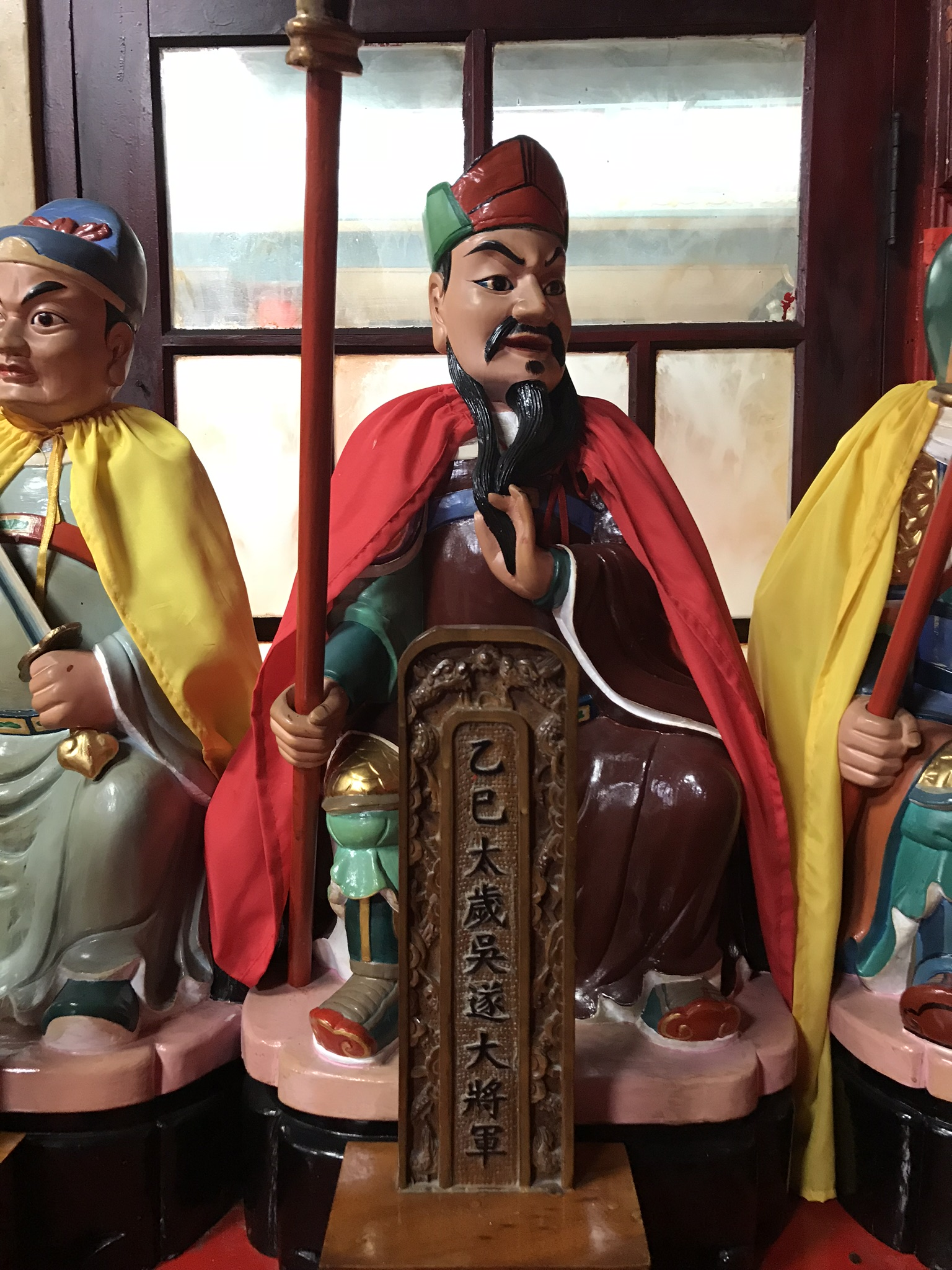 乙巳太歲吳遂大將軍神像